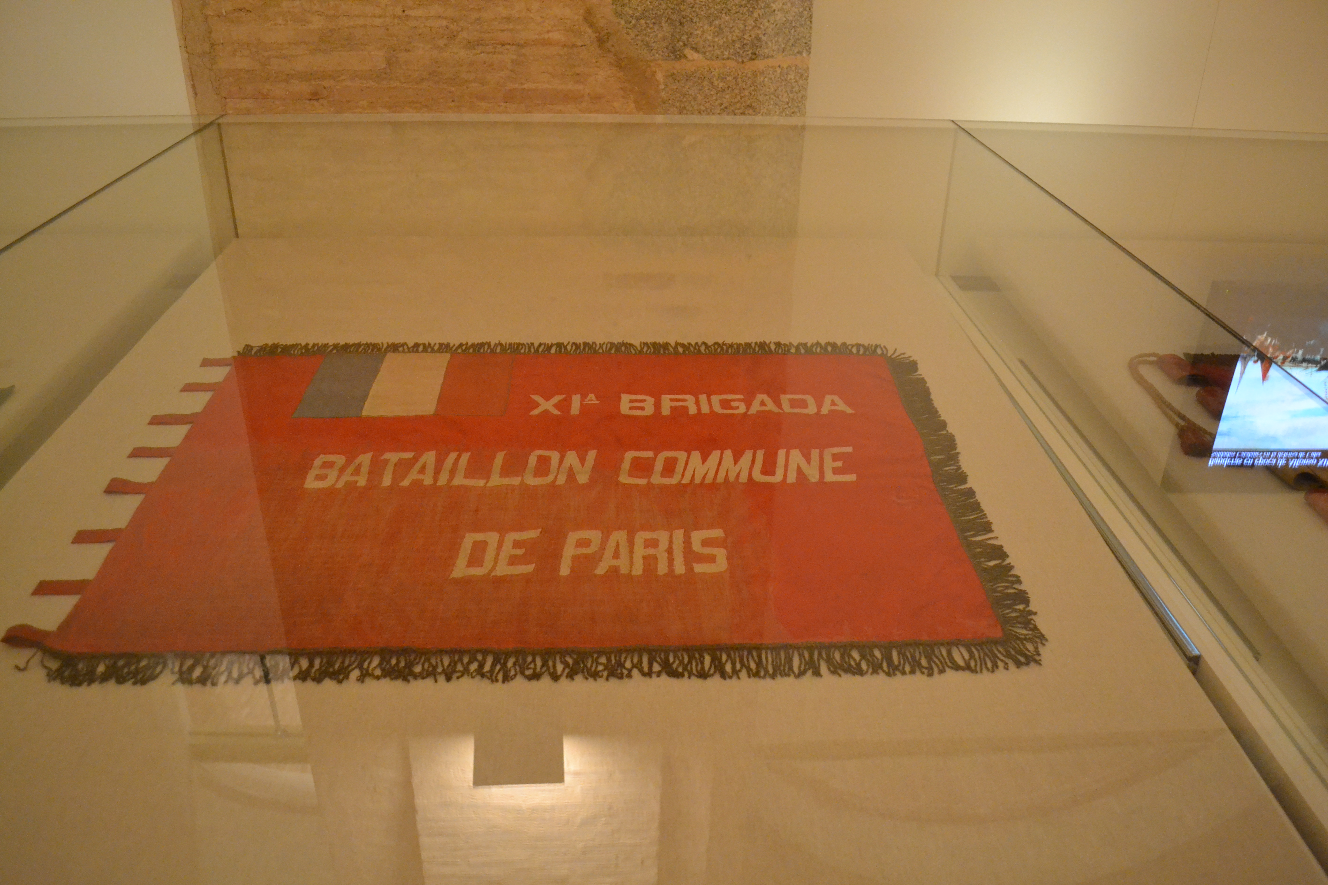 Bandera del Batallón "Comuna de París" integrado en las Brigadas Internacionales y conservada actualmente en el Museo del Ejército.